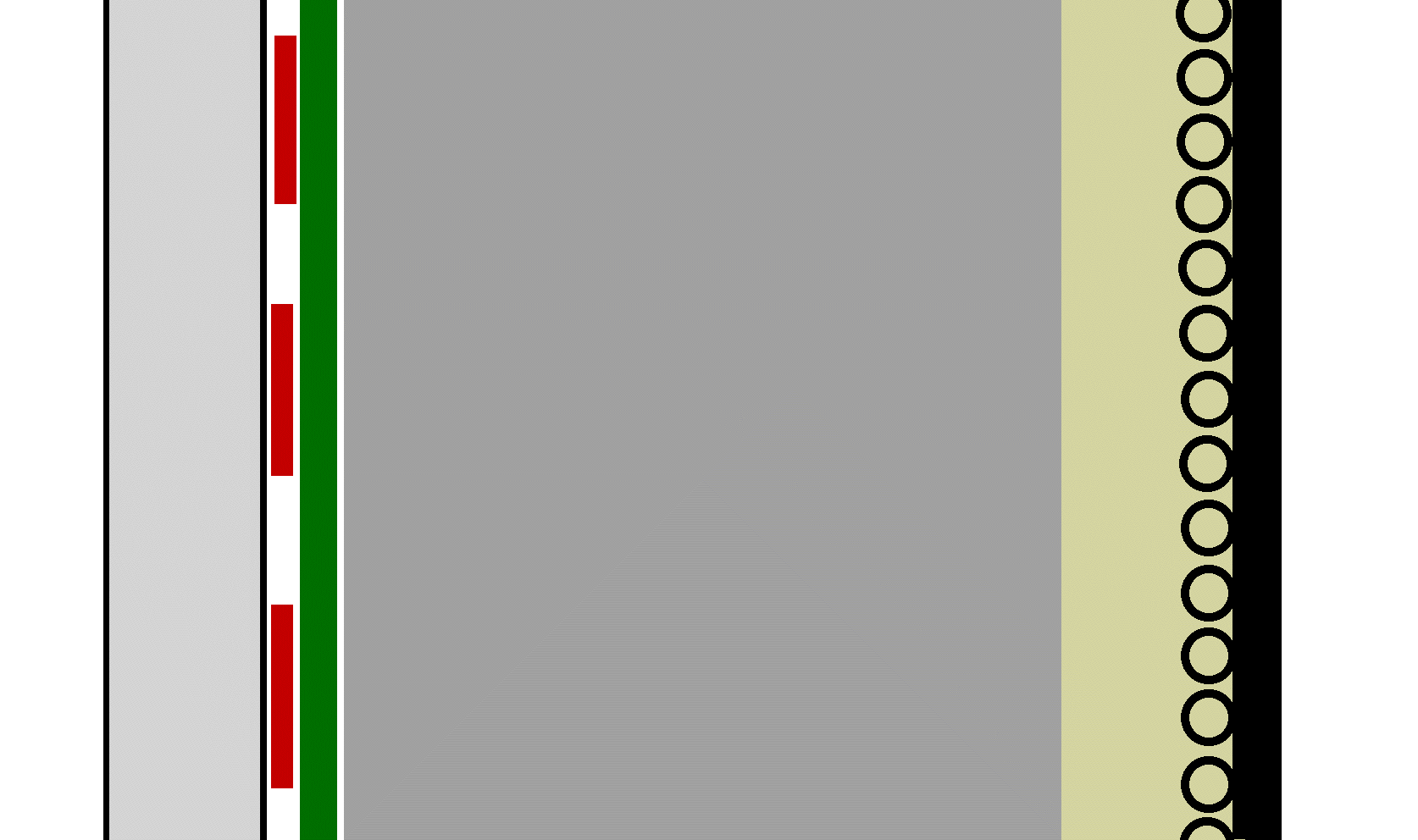 Aufbau einer modernen Rennstrecken-Auslaufzone (schematisch, von links nach rechts): Fahrbahn, Curb, Gras- oder Kunstrasenstreifen, Asphalt, Kiesbett, Reifenstapel, Betonmauer